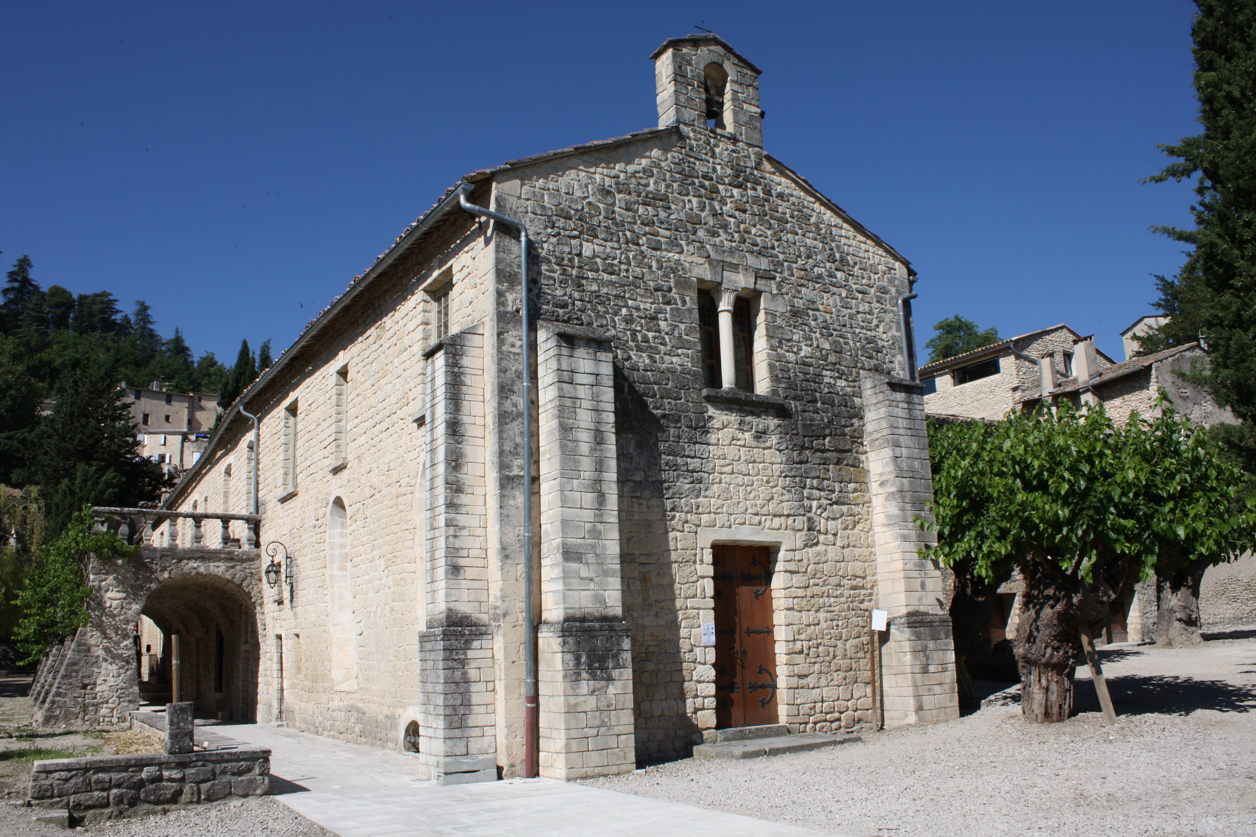 Couvent des Cordeliers de Forcalquier (Alpes-de-Haute-Provence)